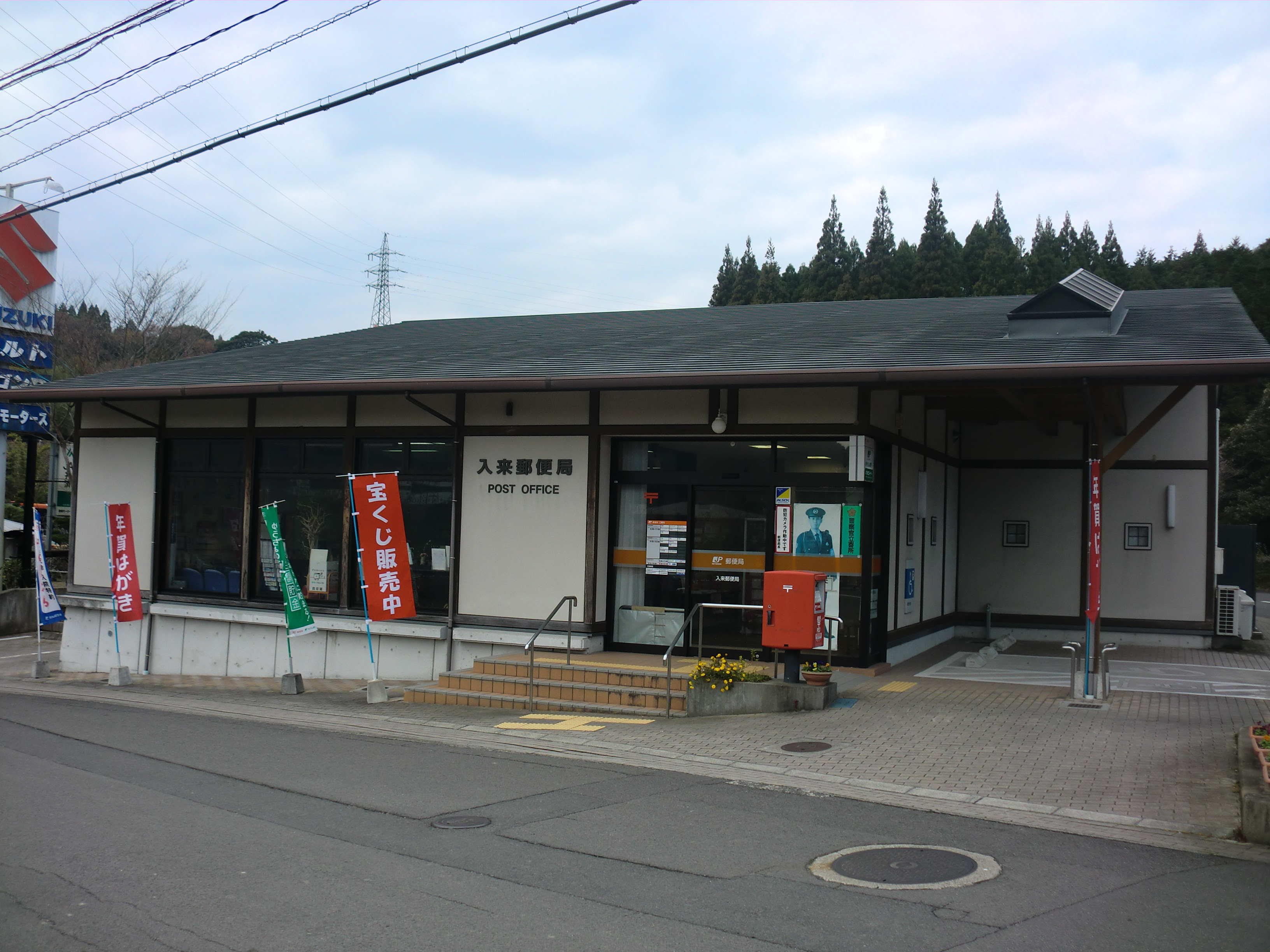 薩摩川内市にある入来（いりき）郵便局